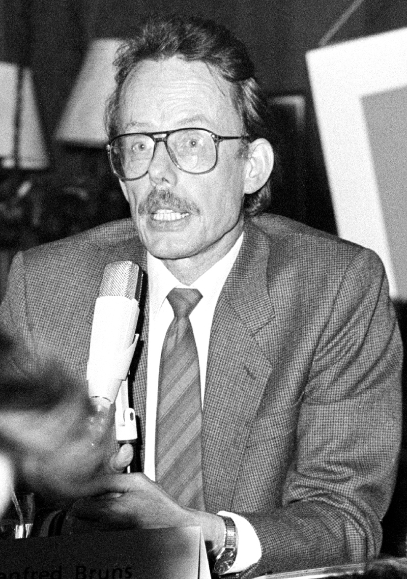 Manfred Bruns, Bundesanwalt am Bundesgerichtshof a. D., Sprecher des Lesben- und Schwulenverbandes in Deutschland (LSVD), Bild von 1986 (in München)